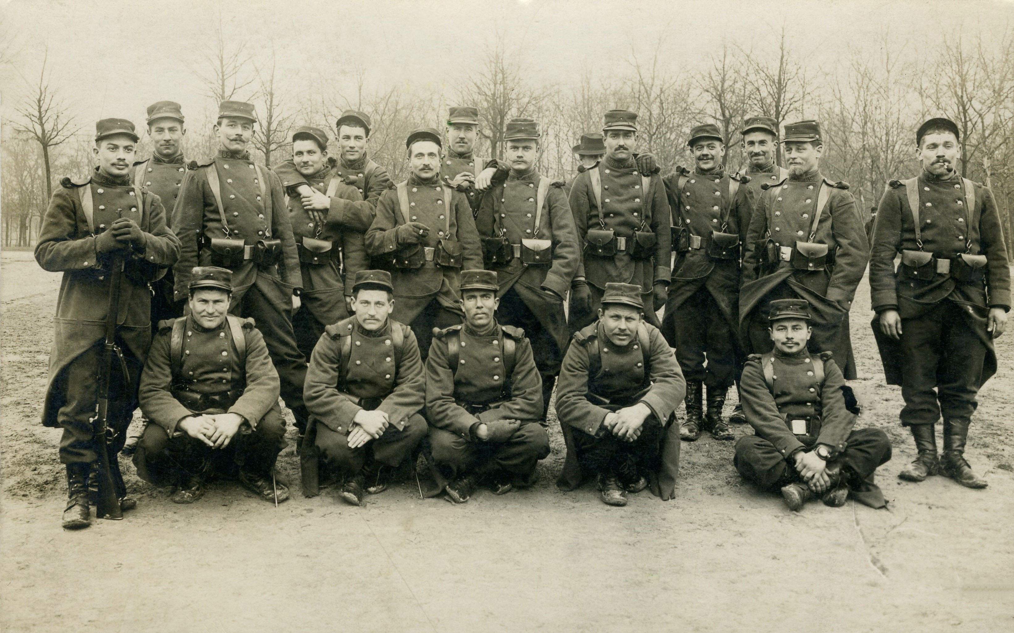 Un groupe de militaires appelés du 89e régiment d'infanterie photographié, en hiver, au bois de Vincennes en 1908.